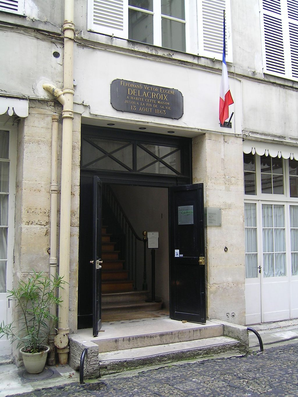 Entrée du musée d'Eugène Delacroix Photo personnelle (own work) de Marianna